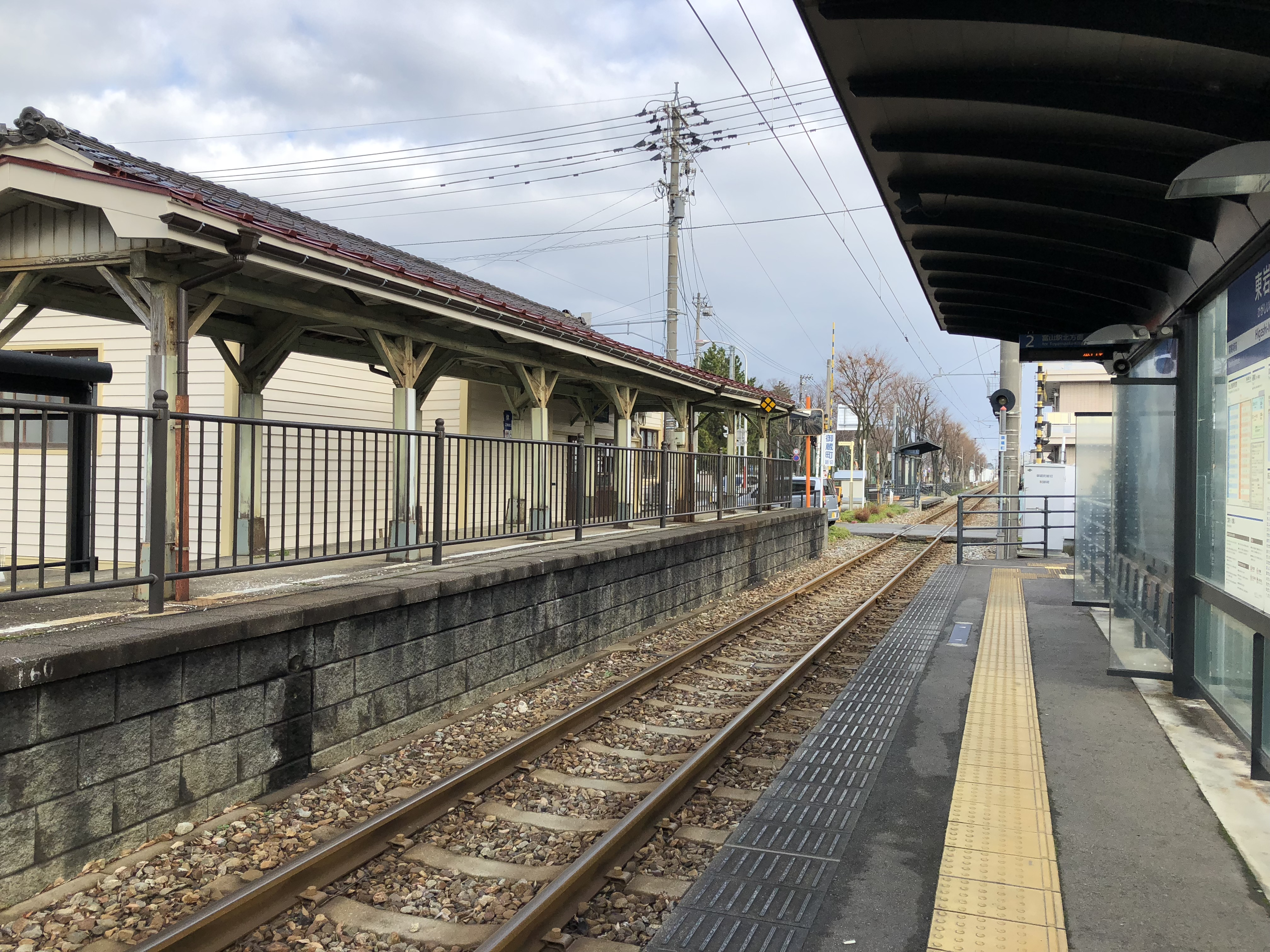 富山ライトレール富山港線東岩瀬駅